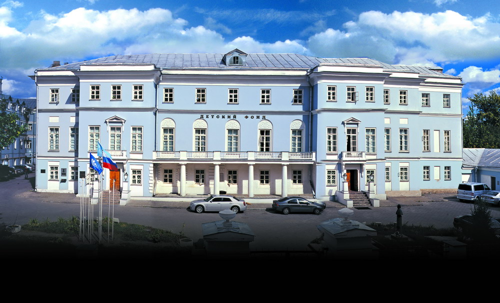 Здание Российского детского фонда в Москве